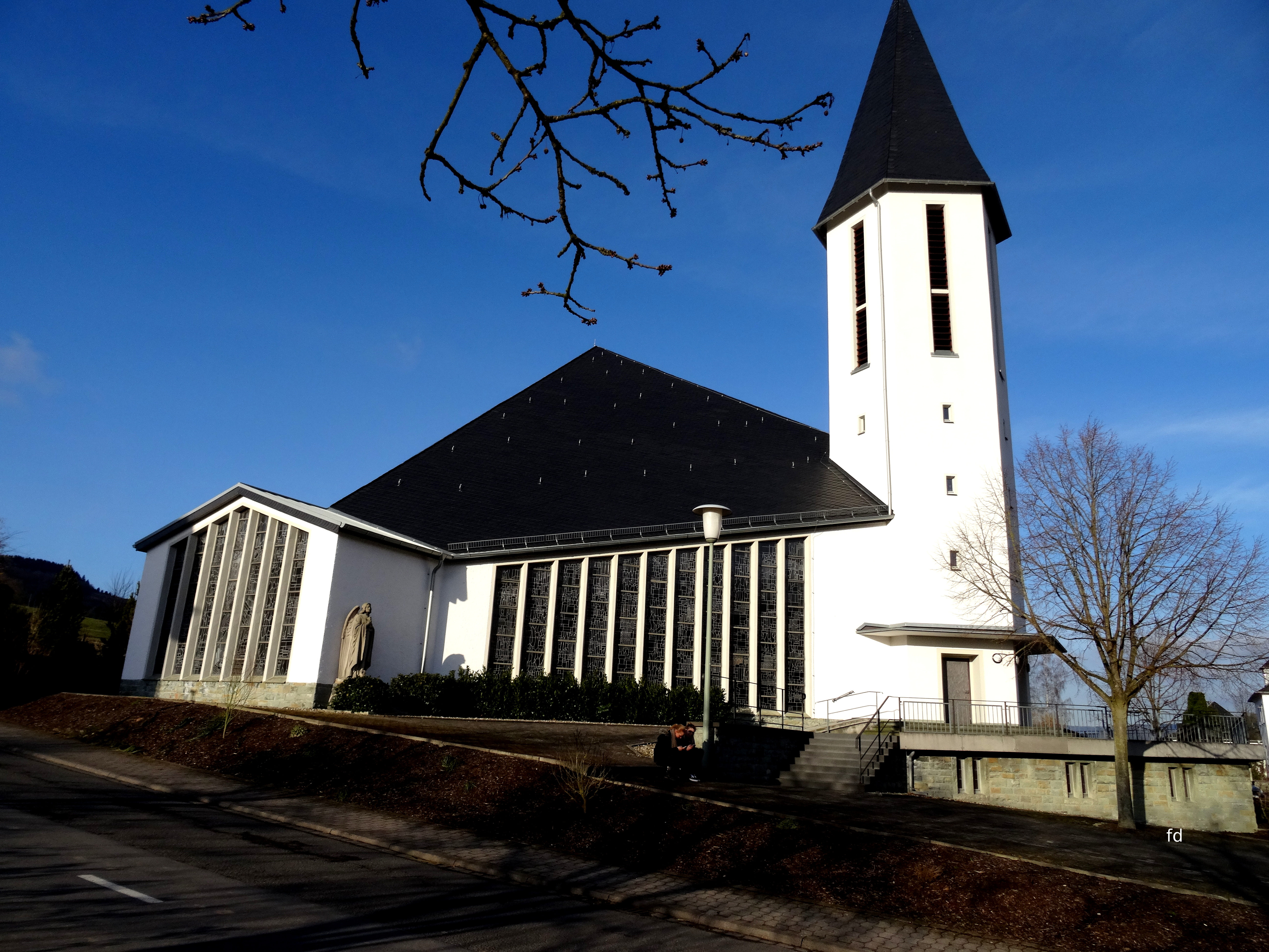 Katholische St.-Luzia-Kapelle in Meschede-Berge